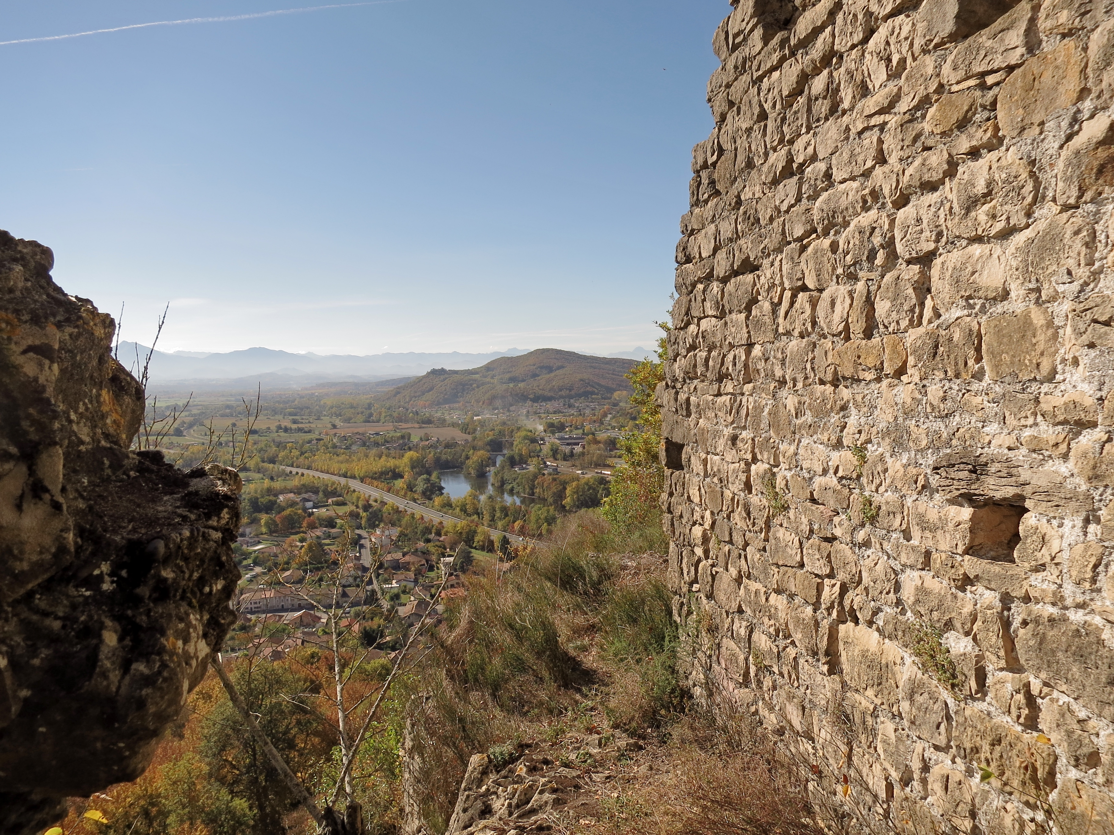 Roquefort-sur-Garonne (Haute-Garonne, Midi-Pyrénées, France) - Vue sur le village et le Comminges depuis les ruines du château. On distingue l'A64 et la Garonne avec les Pyrénées en arrière-plan.